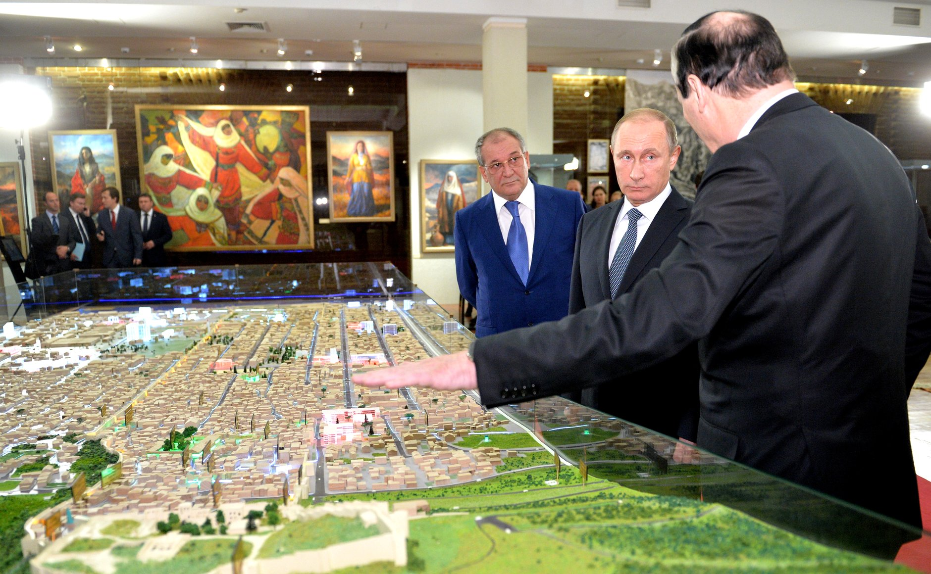 Президент России Владимир Путин, в сопровождении главы Республики Дагестан, посещает выставку, посвящённую 2000-летию Дербента в Государственном историческом музее